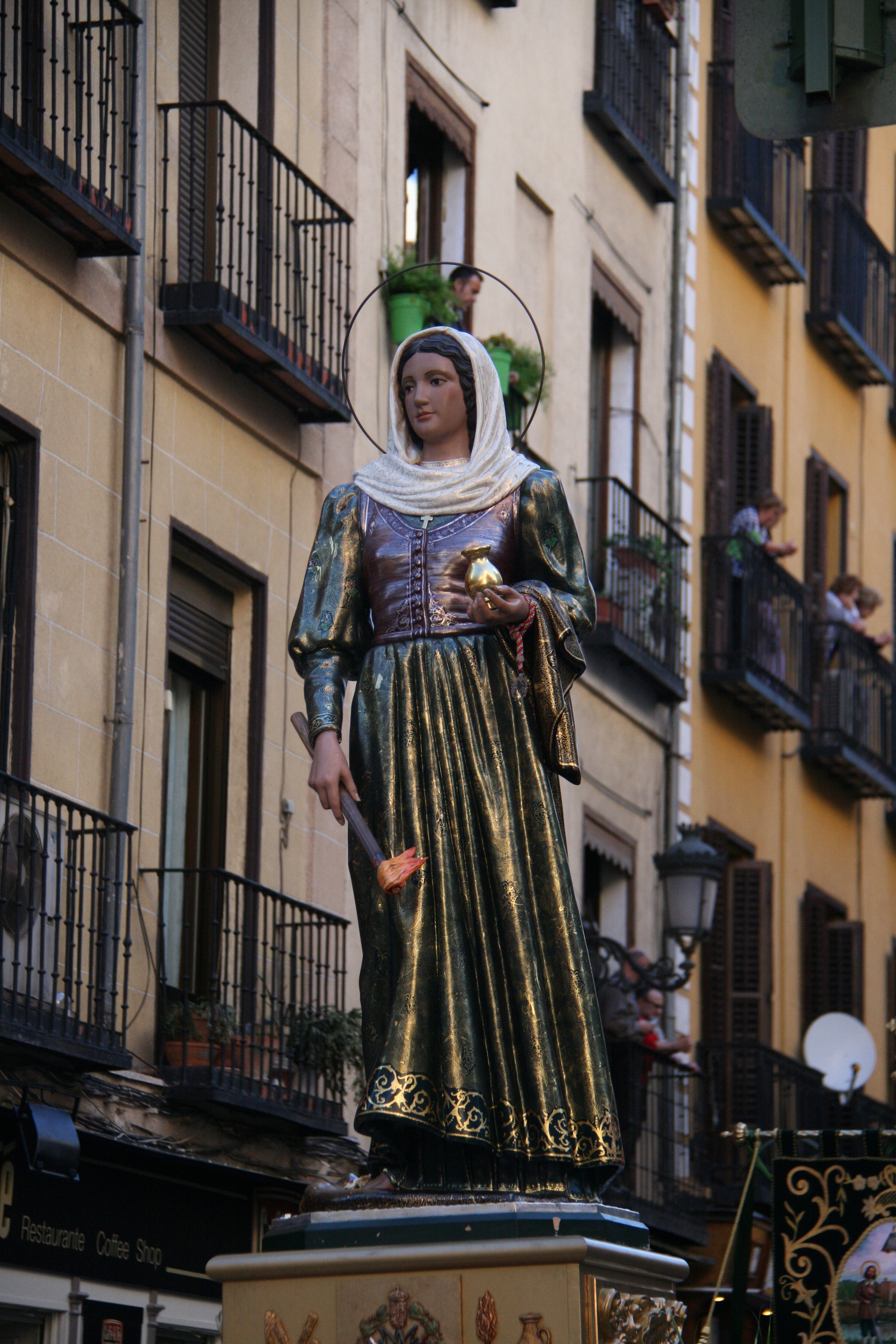 Santa María de la Cabeza - Preocsión de San Isidro